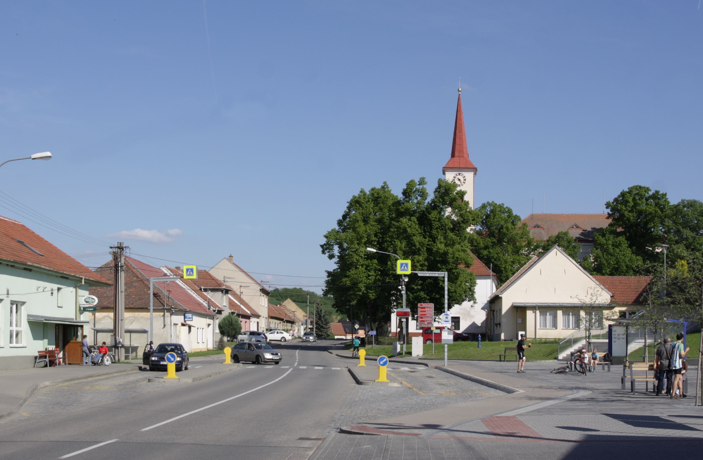 Otnice - centrum obce.